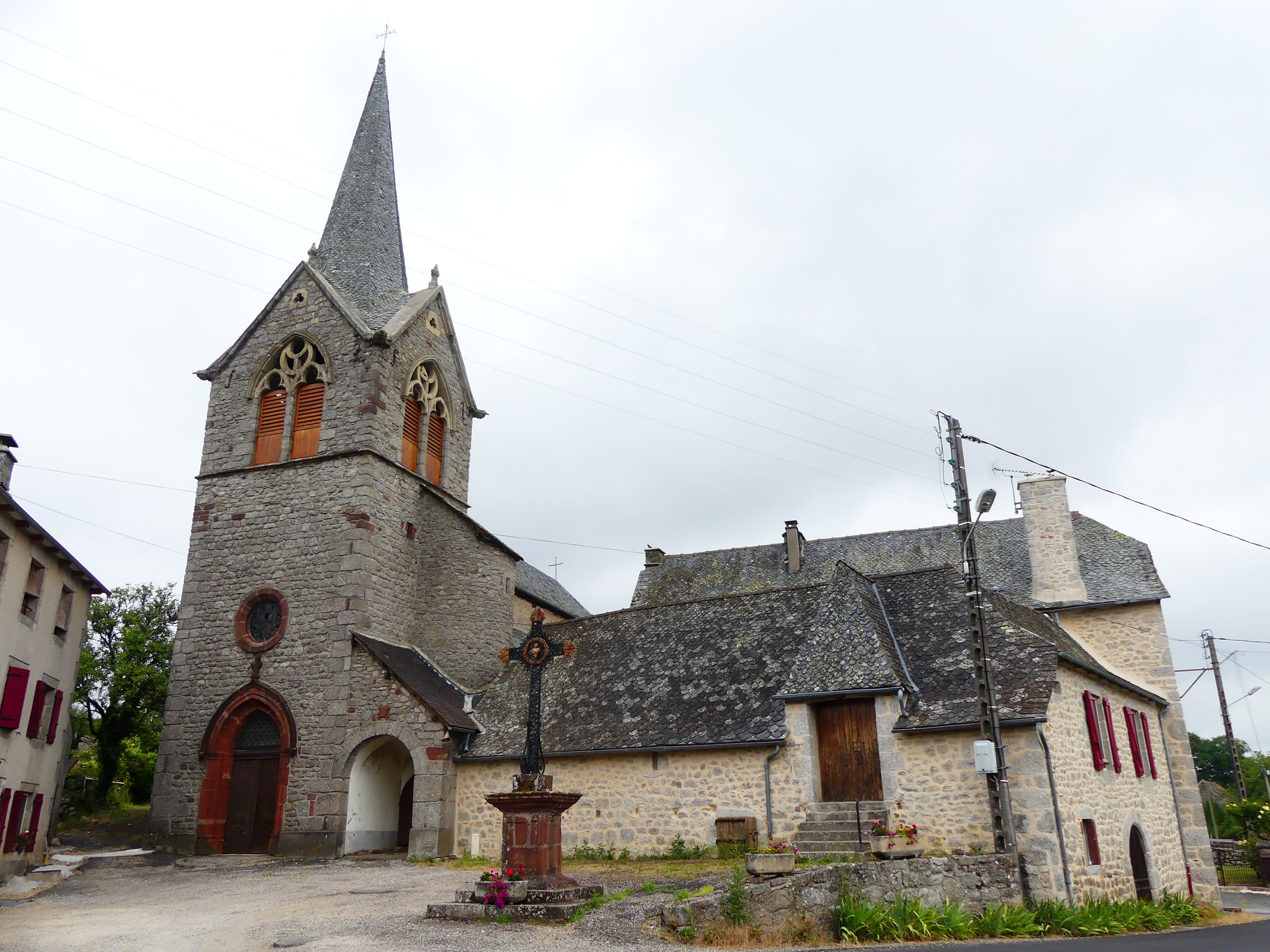 L'église de Saint-Félix-de-Lunel, Aveyron, France.